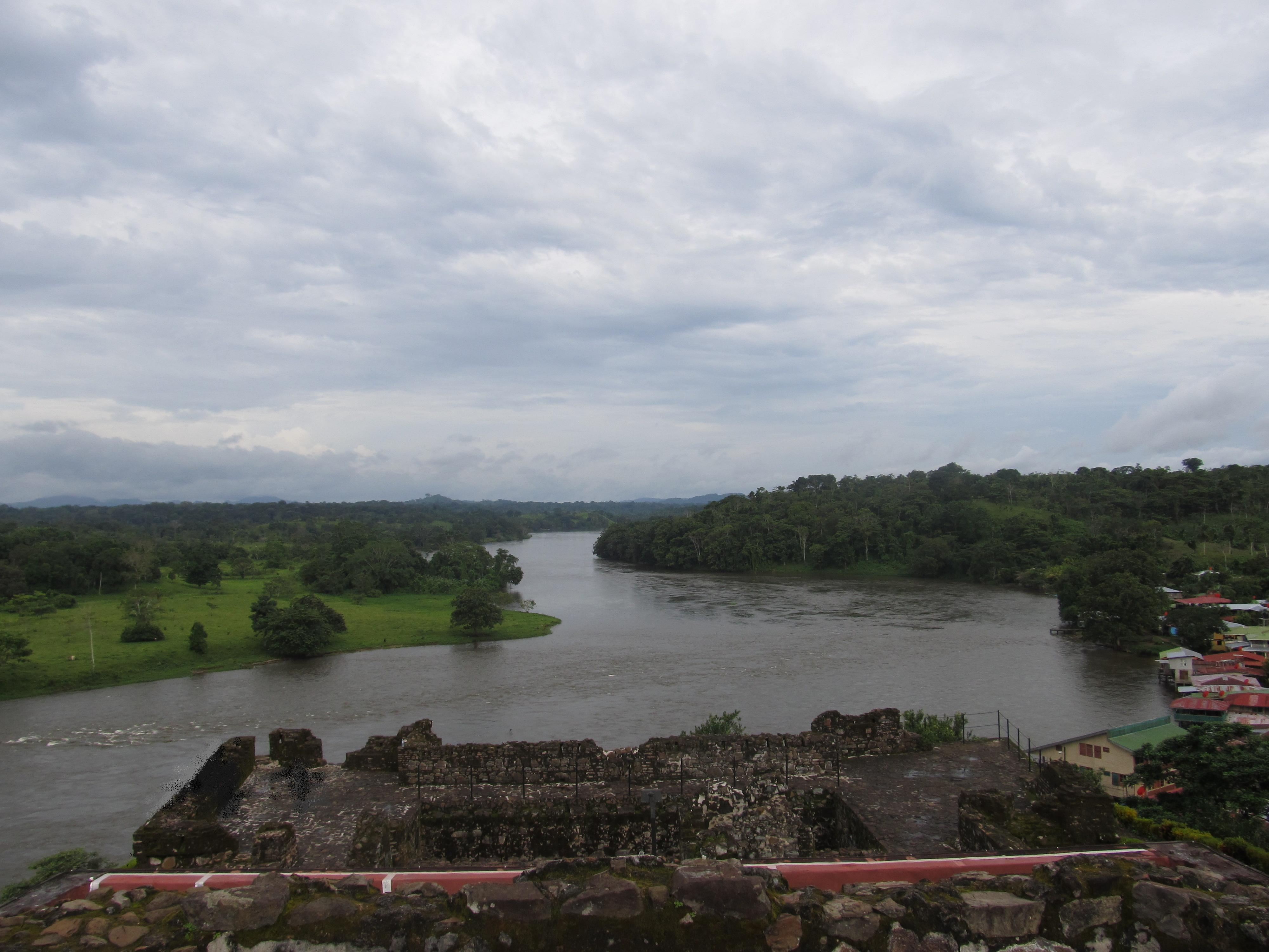 Der Río San Juan, in östliche Richtung bei El Castillo, Nicaragua.